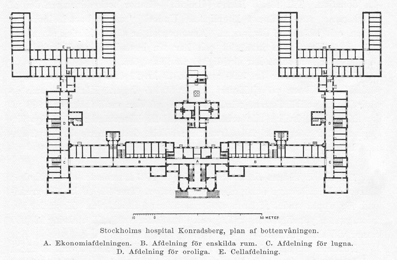 Konradsberg eller Konradsbergs hospital i Stockholm, planritning